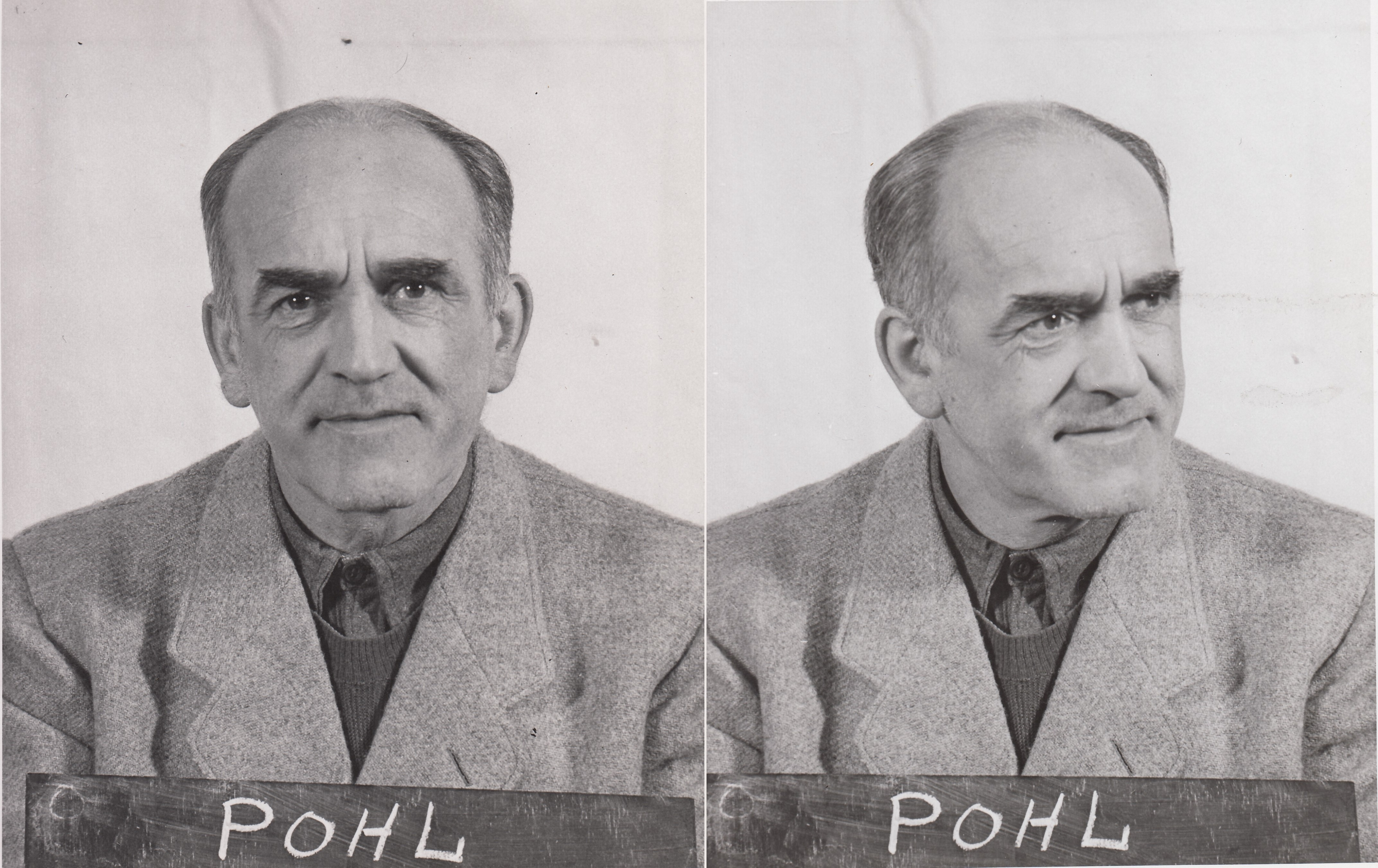 Oswald Ludwig Pohl (* 30. Juni 1892 in Duisburg; † 7. Juni 1951 in Landsberg), deutscher SS-Obergruppenführer und general der Waffen-SS. Pohl war Leiter des SS-Wirtschafts- und Verwaltungshauptamtes und in dieser Funktion führend an der Durchführung des Holocaust beteiligt. Während der Nürnberger Prosse wurde Pohl zum Tode verurteilt und später hingerichtet.